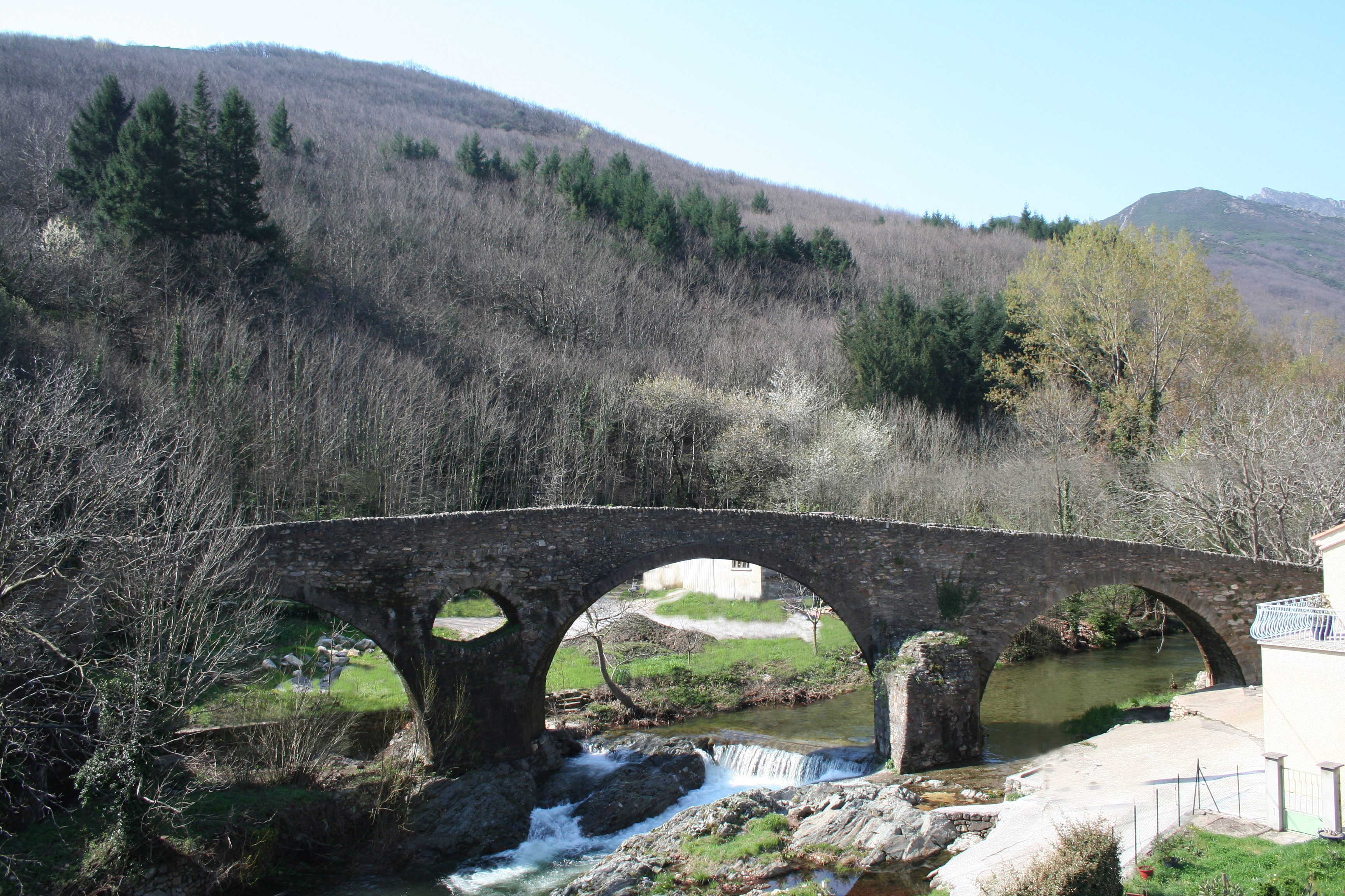 Rosis (Hérault) - ancien pont d'Andabre sur la Mare (XVIIIe s).